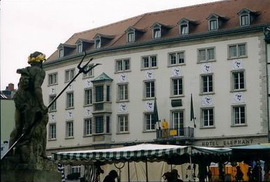 Kunstprojekt "Have a nice round" an der Fassade des Hotel Elephant Weimar